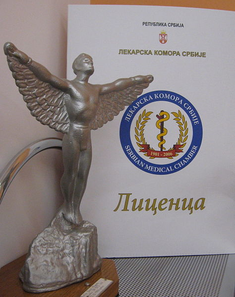 Лиценца лекарске коморе Србије и статуа Икара, симбола ваздухопловства, Аутор. др М.Димић, Ниш, 2009.